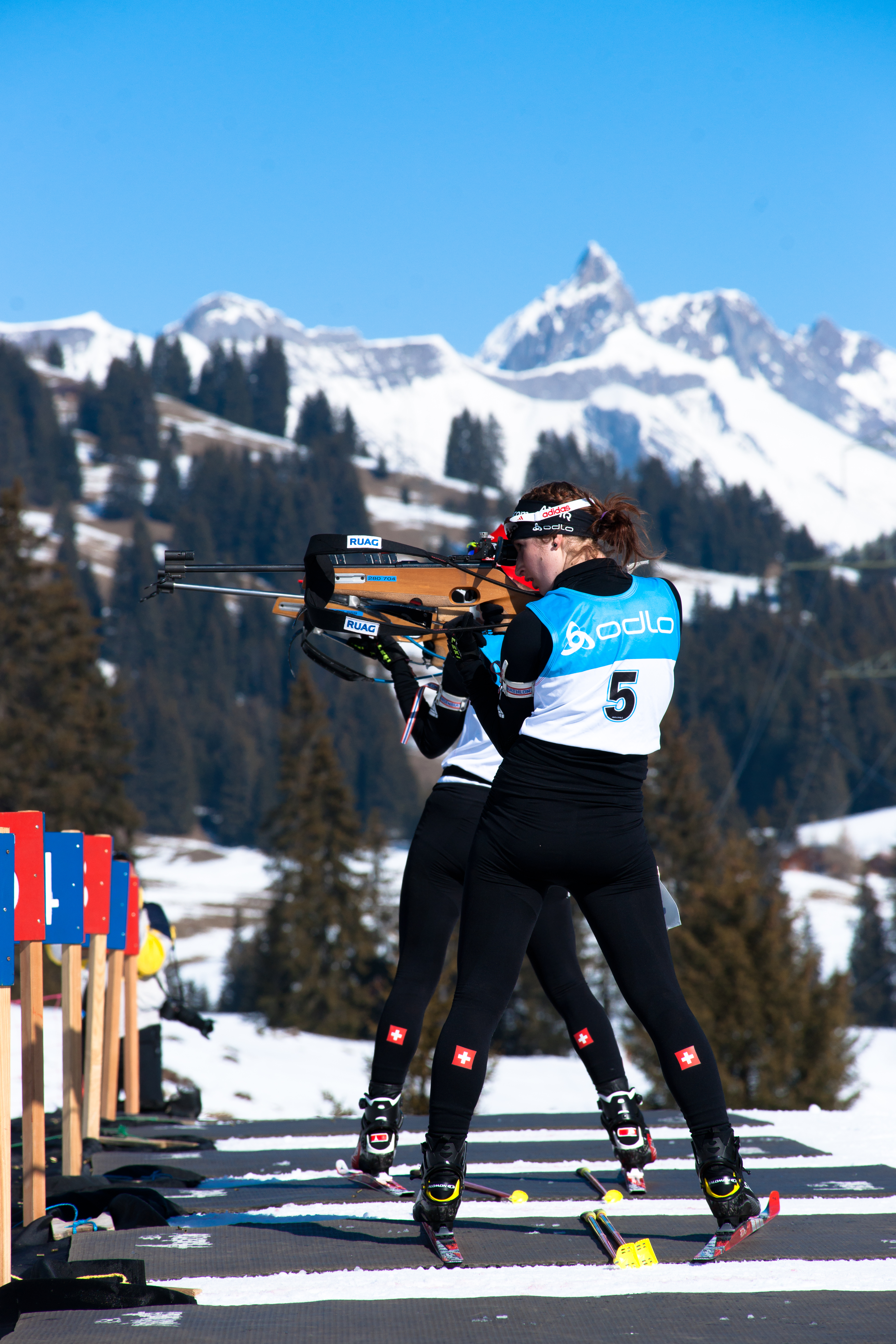 Biathlètes femmes (Flurina Volken) aux Mosses pour la Coupe suisse de Biathlon.